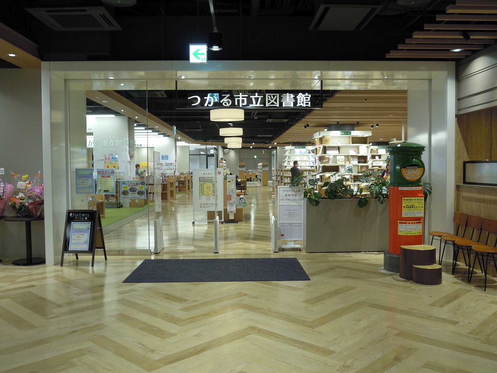 青森県つがる市のイオンモールつがる柏内にあるつがる市立図書館の入口